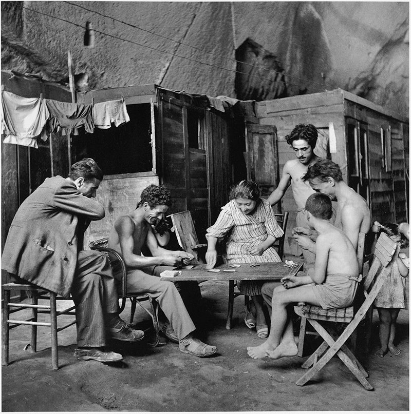 David Seymour - Napoli, famiglia abitante in una grotta a seguito degli eventi bellici.